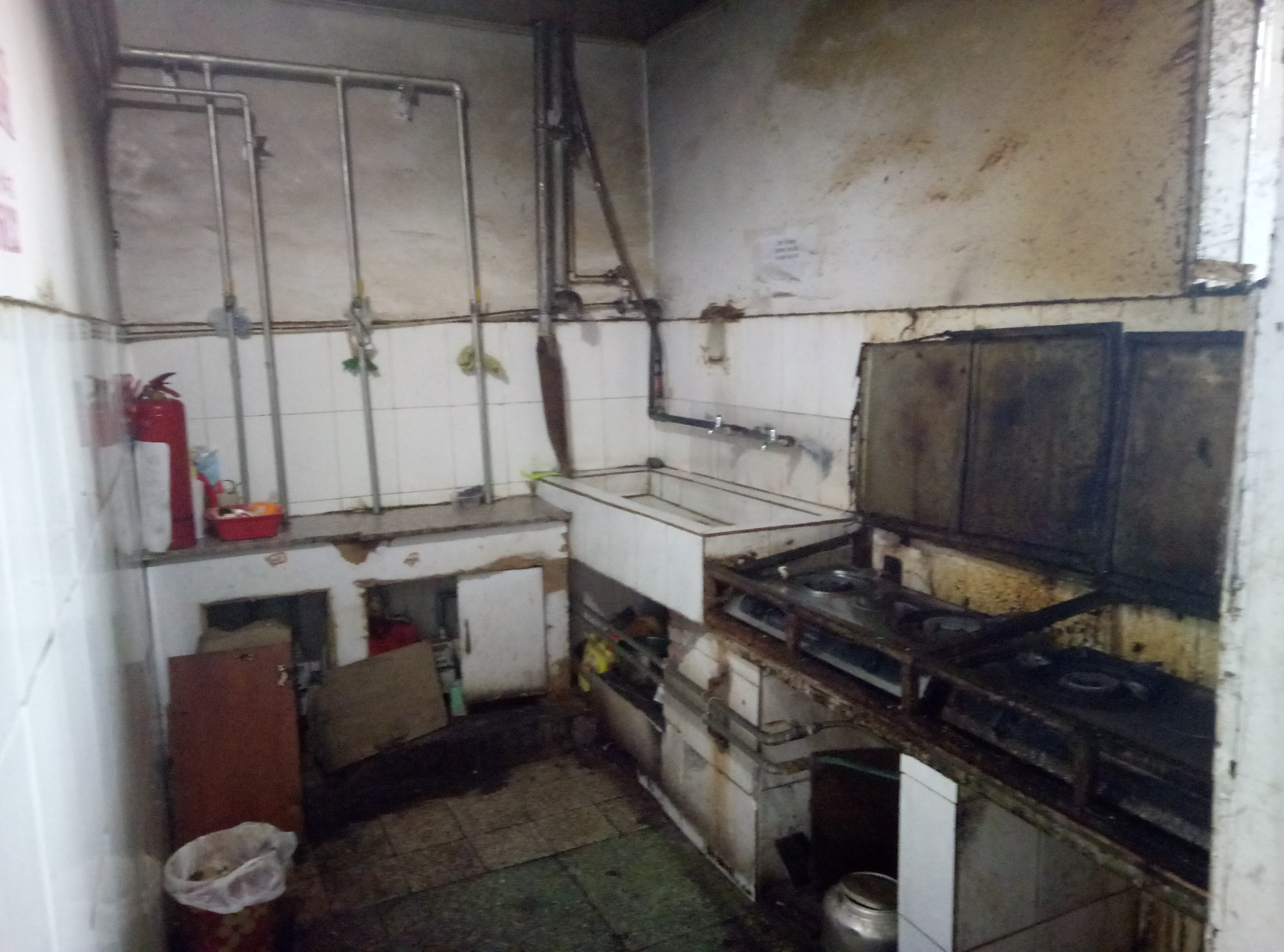 位于北京市东城区的安化楼。